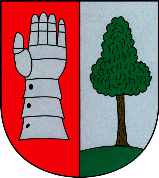 Znak obce Nový Ples